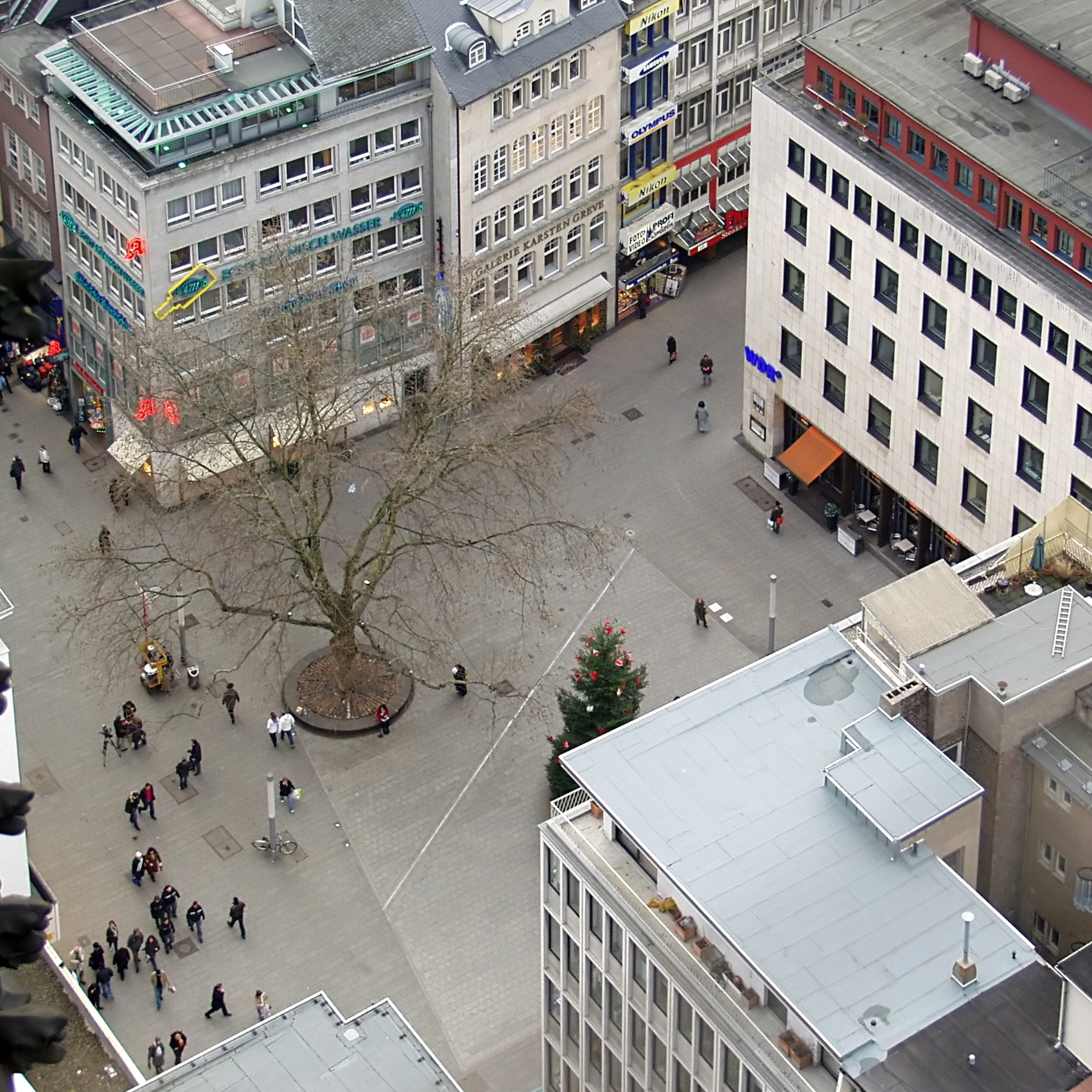 Wallrafplatz in Köln, vom Südturm des Kölner Domes.